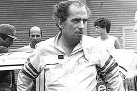 Fotografía de Jorge Martínez Boero